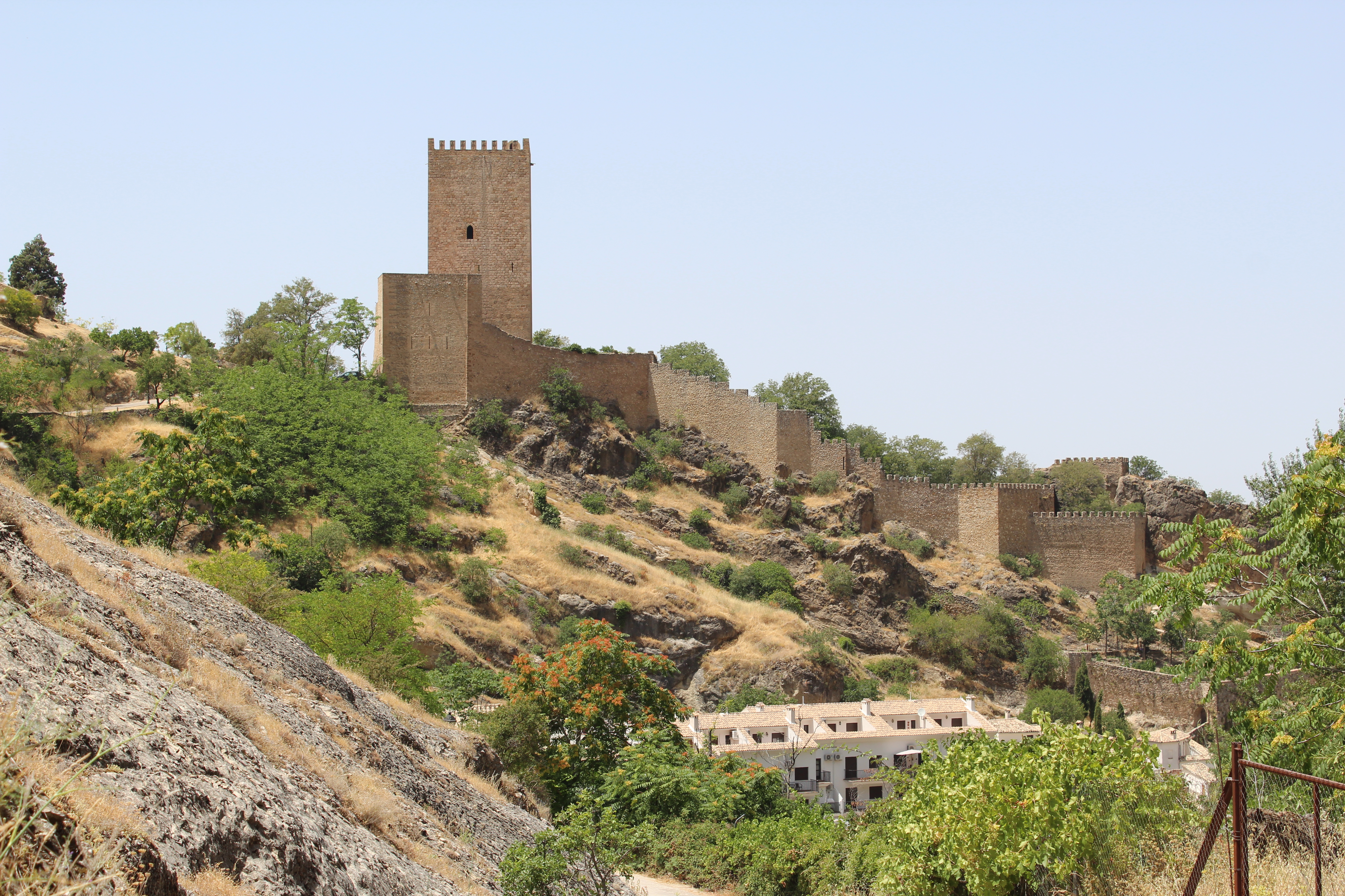 Vista del Castillo de la Yedra desde el camino hacia la Ermita de San Miguel.